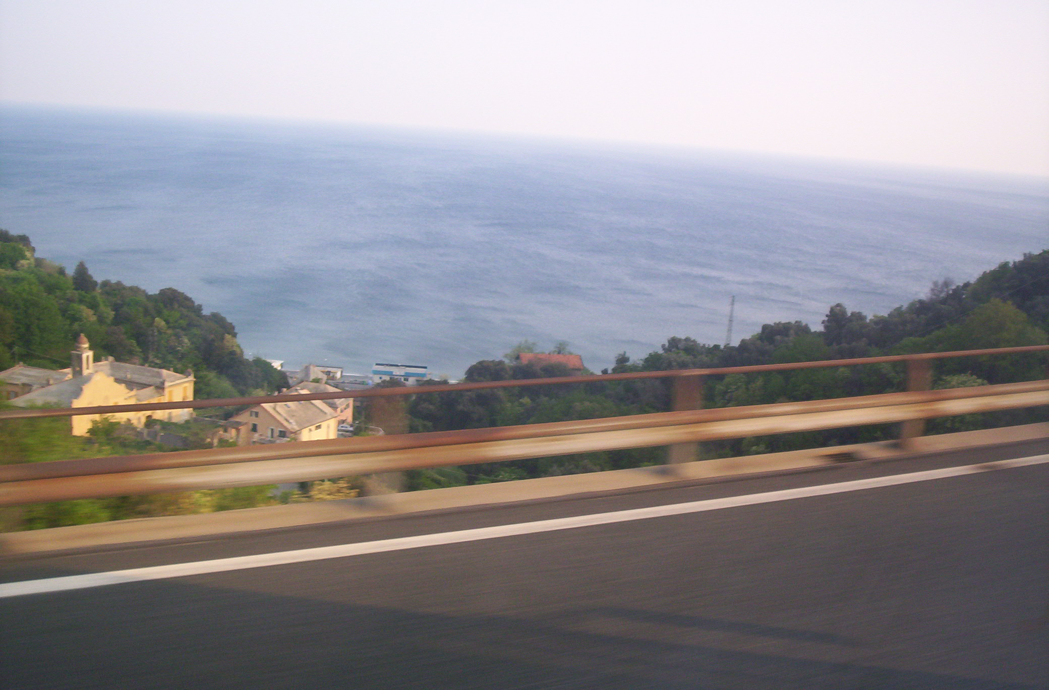 Genova, la frazione di Vesima vista dall'autostrada A10